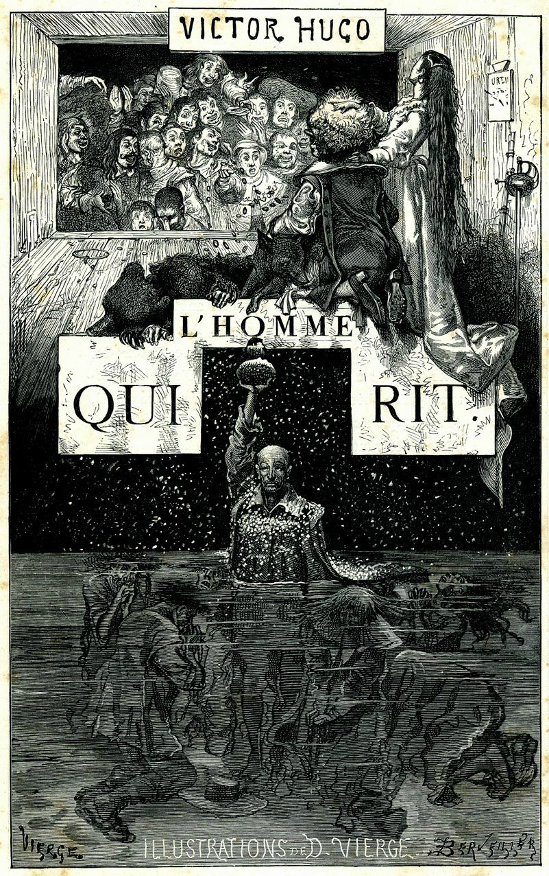 La partie supérieure de la gravure représente le public anglais contemplant une exhibition de « l'homme qui rit ». La partie inférieure figure la noyade des comprachicos en prière tandis que le docteur Geestemunde élève une gourde scellée contenant la confession manuscrite relative à Gwynplaine. Page de garde du roman de Victor Hugo, L'Homme qui rit, Paris, Librairie illustrée, 1876. Illustration de Daniel Vierge, bois gravé par Édouard Berveiller [1].